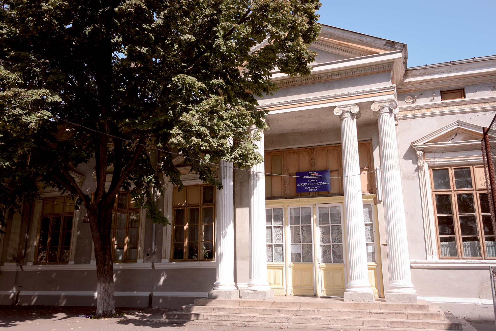 Fosta Școală de băieți a comunității elene